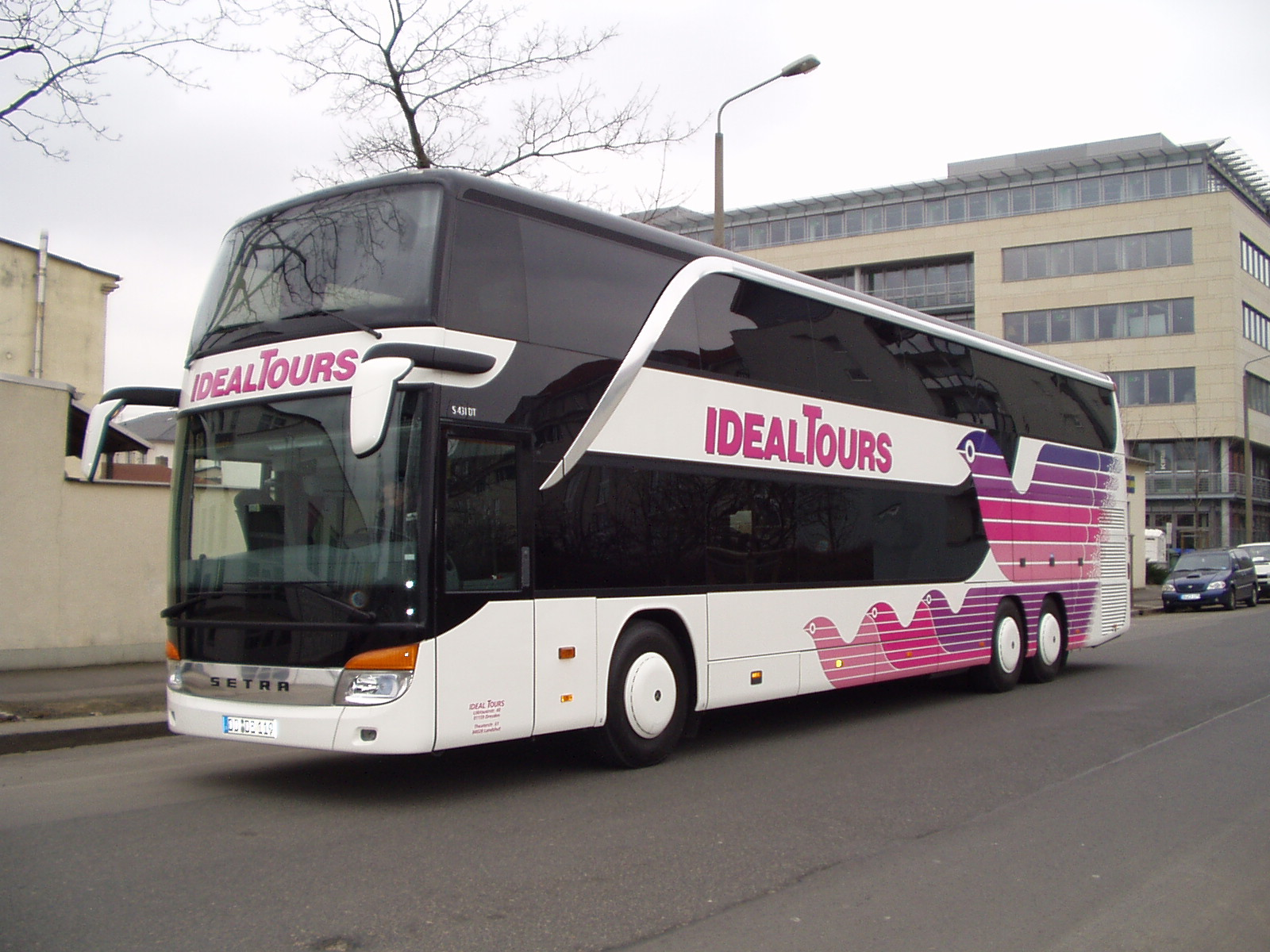 Setra S 431 DT (Doppelstockbus) Sachsen Idealtours GmbH aus Dresden Eigene Aufnahme - M. Glöckner